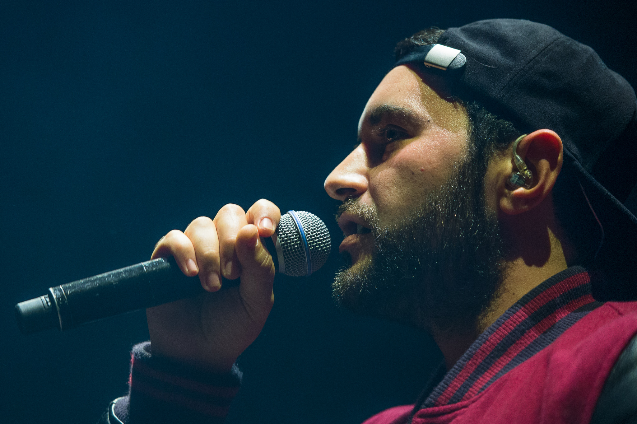 Arena Nürnberger Versicherungen,Chefket,Concertbüro Franken,Konzert,Livekonzert,Livemusik